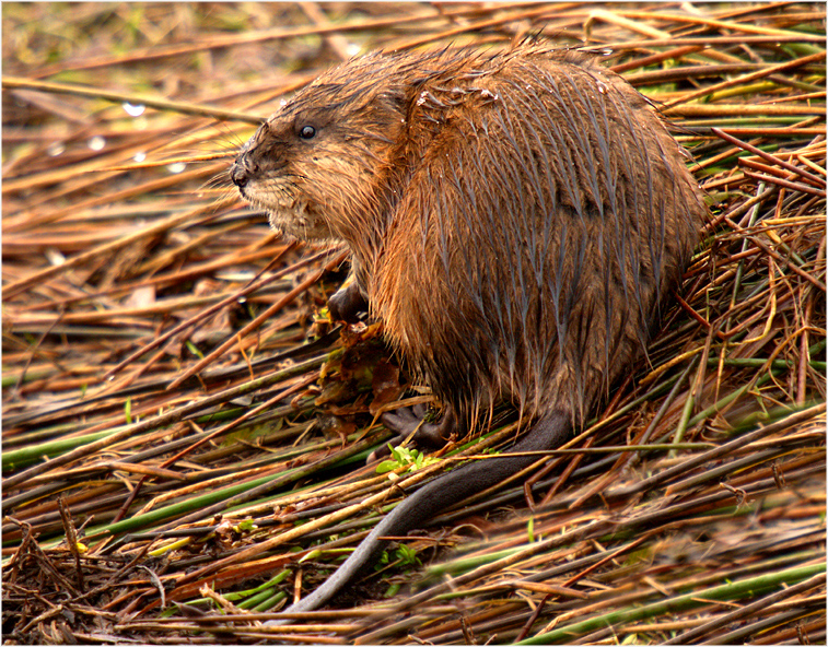 ausgewachsene Bisamratte. Aufnahme aus dem Bayerischen Wald.